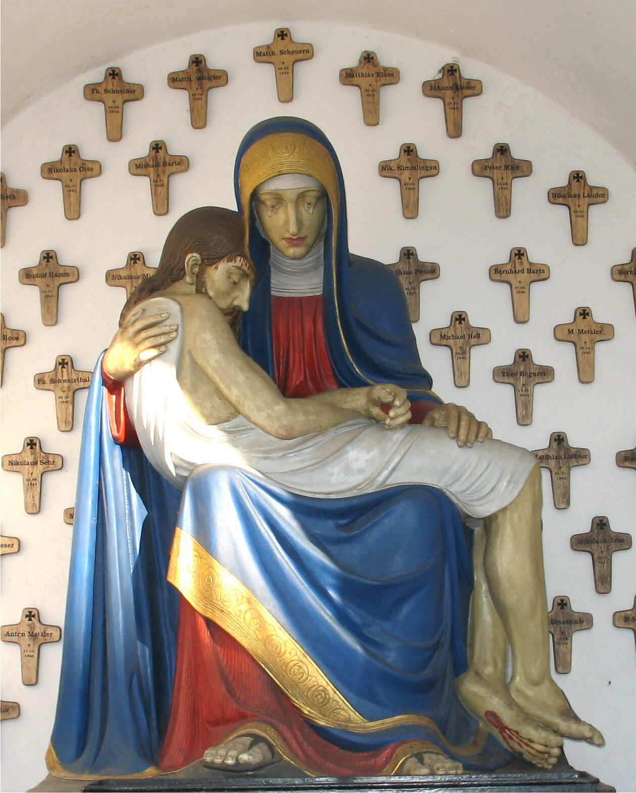 Statu an enger Kapell zu Butzweiler